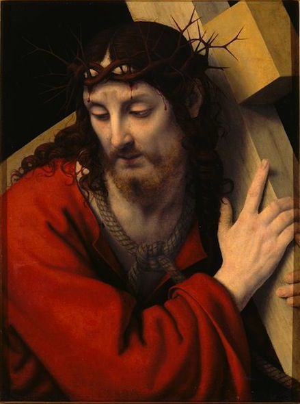 Le Christ portant sa Croix, 1513, huile sur panneau, 45,5 x 34 cm, Nantes, musée des Beaux-arts